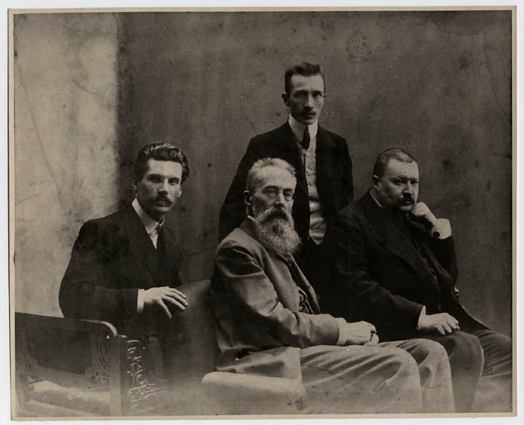 Н.А.Римский-Корсаков и А.К.Глазунов со своими учениками М.М.Черновым и В.А.Сениловым. Фото 1906 г.